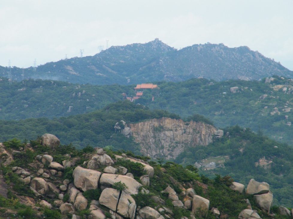 达濠 小望山上向西北望，近处的山岩、断崖、集圣寺、远处的尖尖角的山为八公里外的香炉山